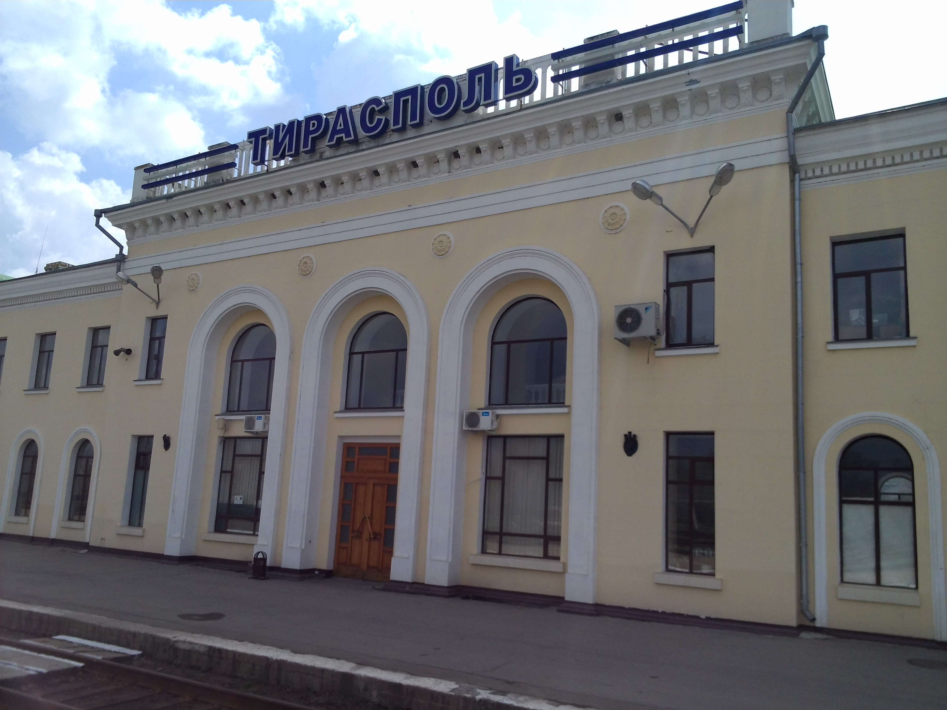 Станція Тирасполь